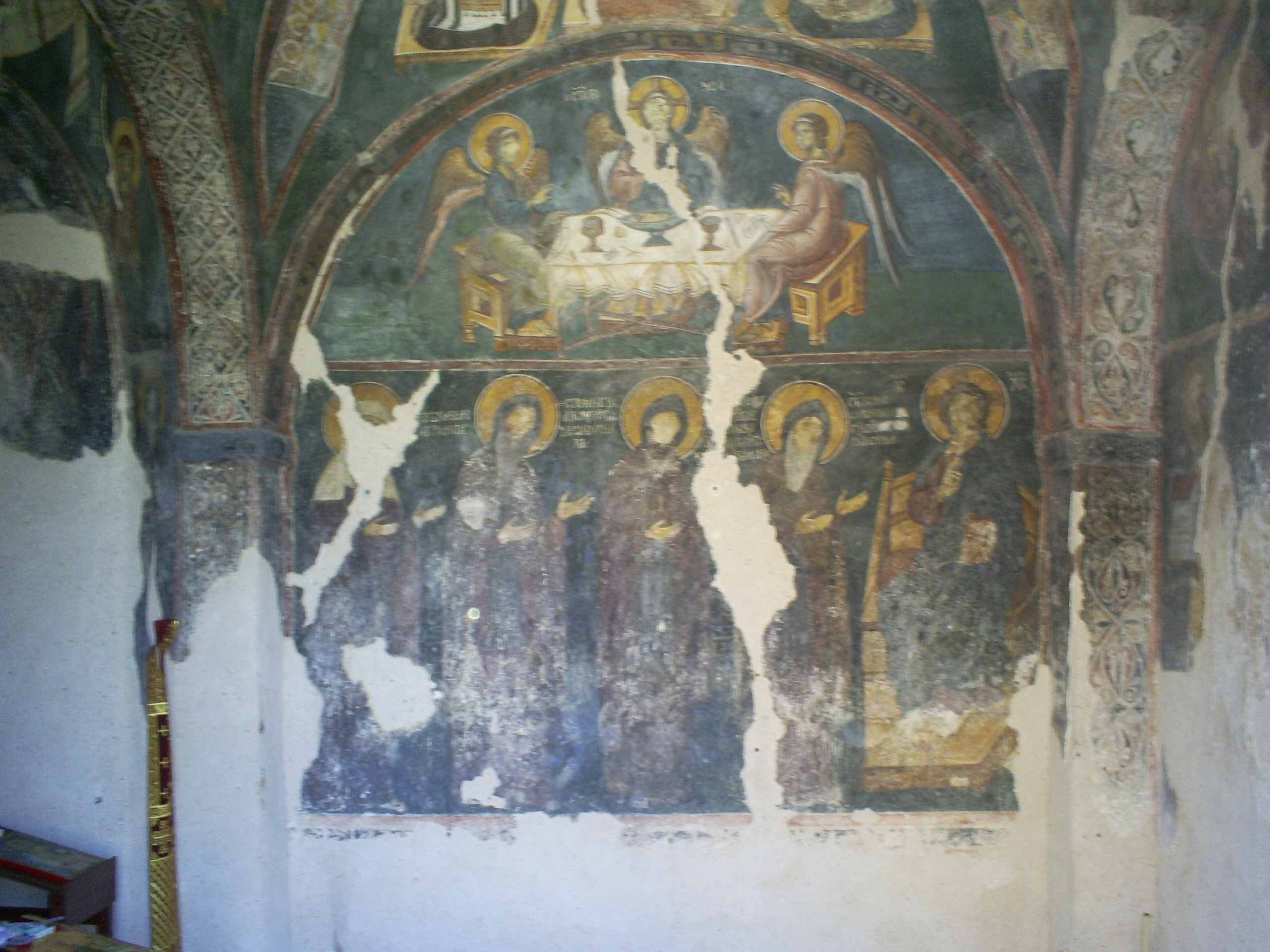 Manastir Djurdjevi stupovi - ikone iznad grobnice